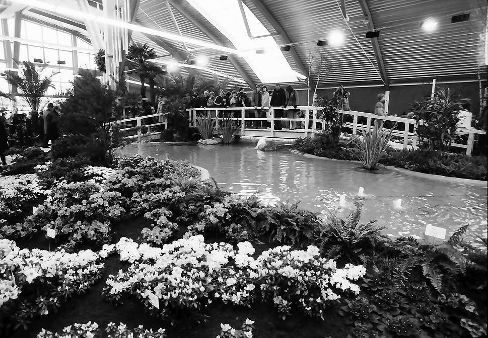 Lörrach: Landesgartenschau, Eröffnung; Blumenhalle, innen